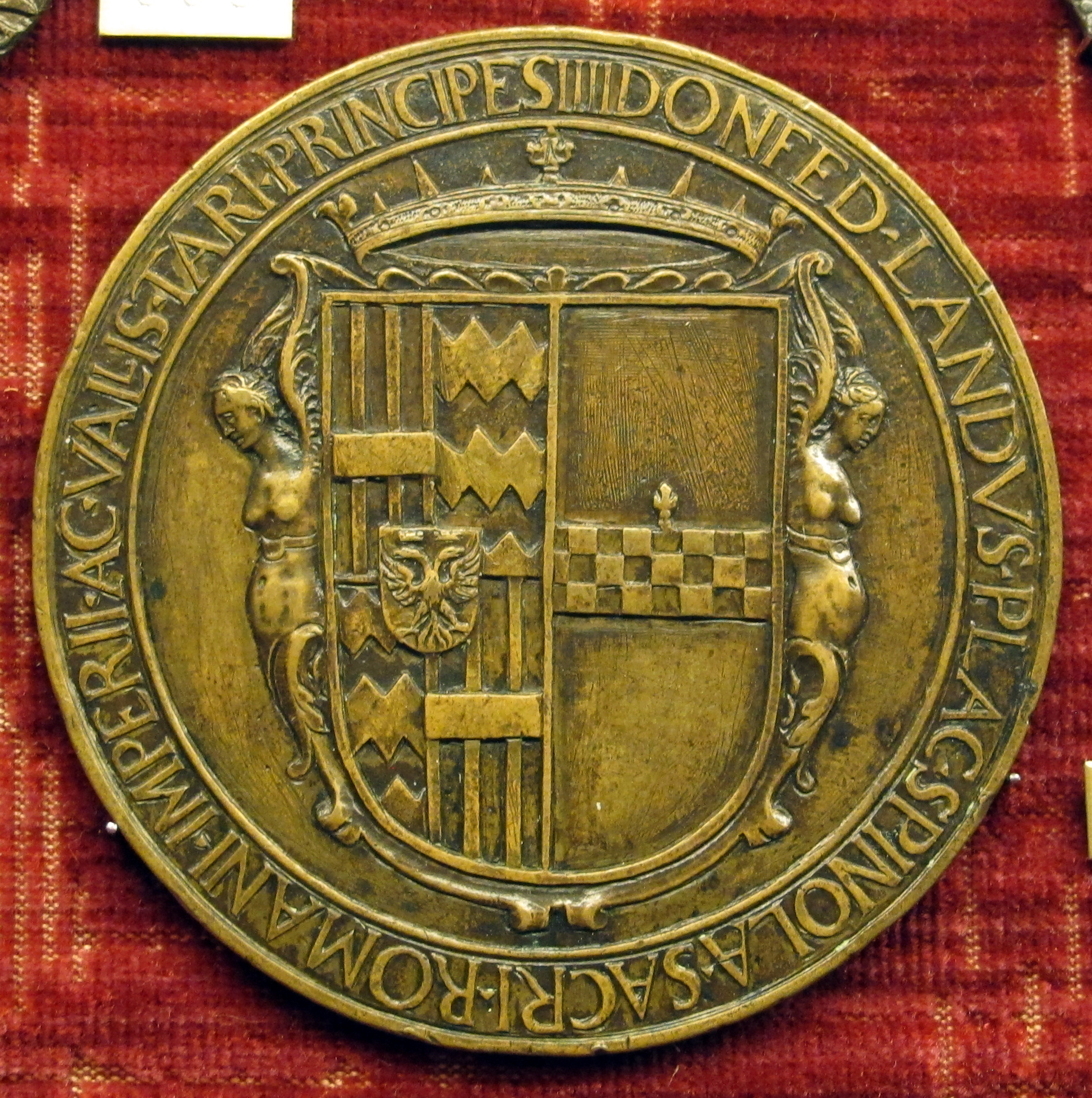 medaglia di autore anonimo